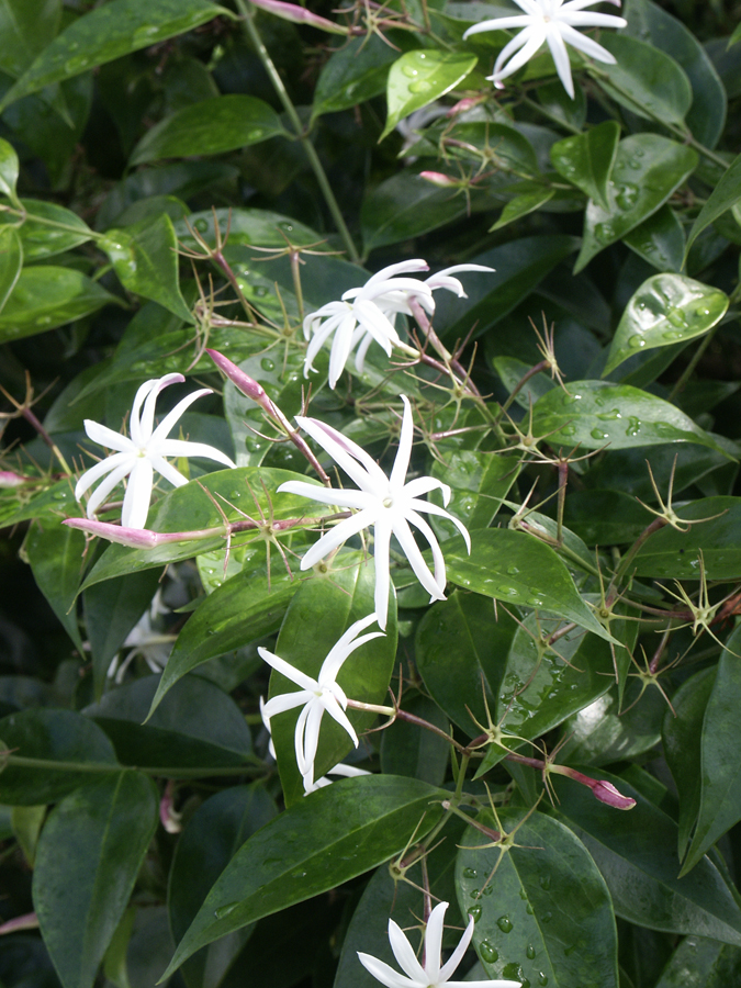 Jasminum laurifolium f. nitidum in private garden, Boynton Beach, Florida